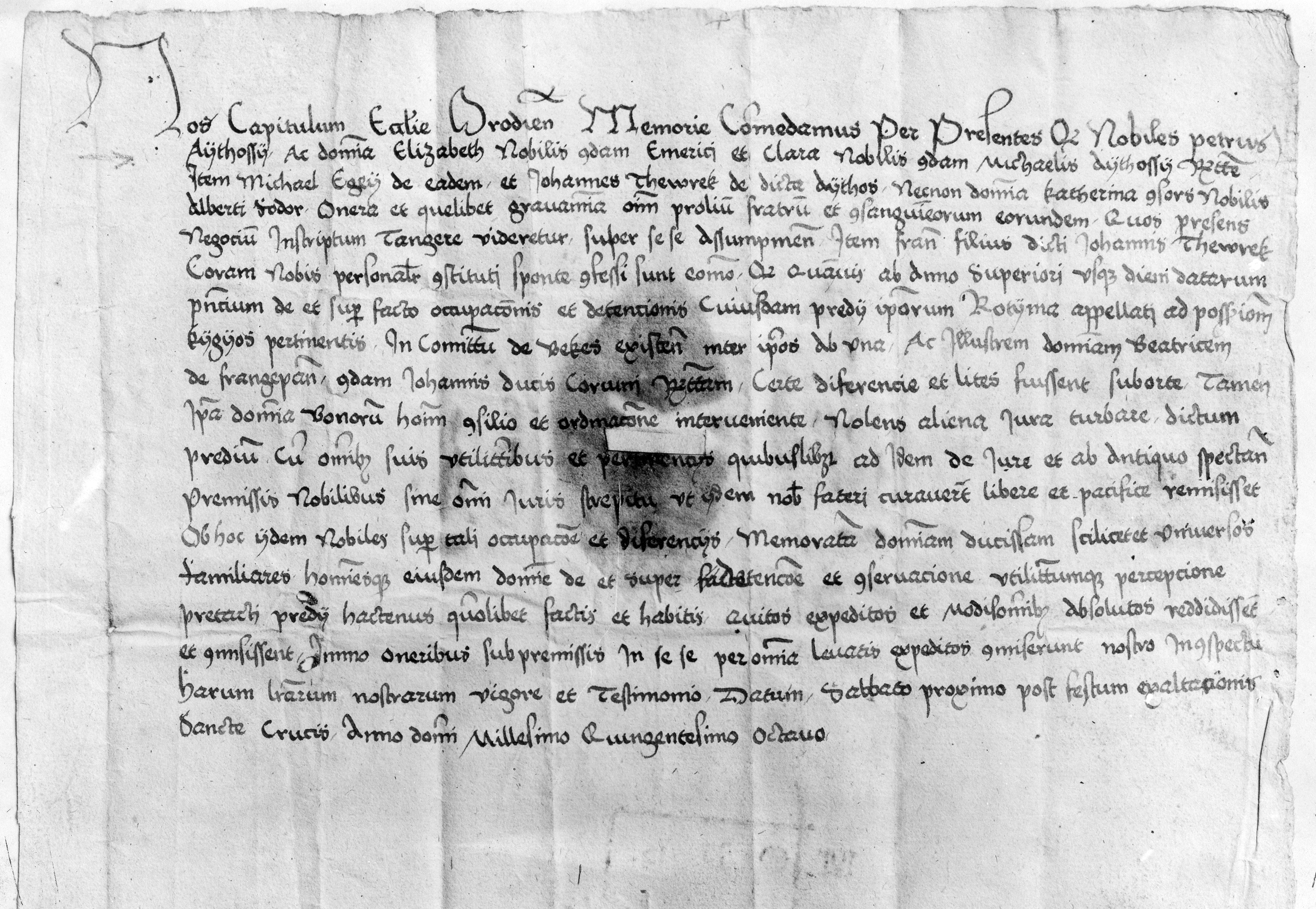 Kígyós nevének említése az aradi káptalan oklevelében – Az aradi káptalan biztosítja, hogy Aythossy Péter, Aythossy Imre özvegye Erzsébet, Aythossy Mihály özvegye Klára, Egey Mihály (Egey András és Aythossy Márta Fia), aythosi Tewrek János és Ferenc, továbbá Fodor …..né Katalin elismerték, hogy Corvin János hg özvegye (Frangepán Beatrix) a békésmi. Kígyós birtokhoz tartozó Rotyma pusztát visszaadta nekik.